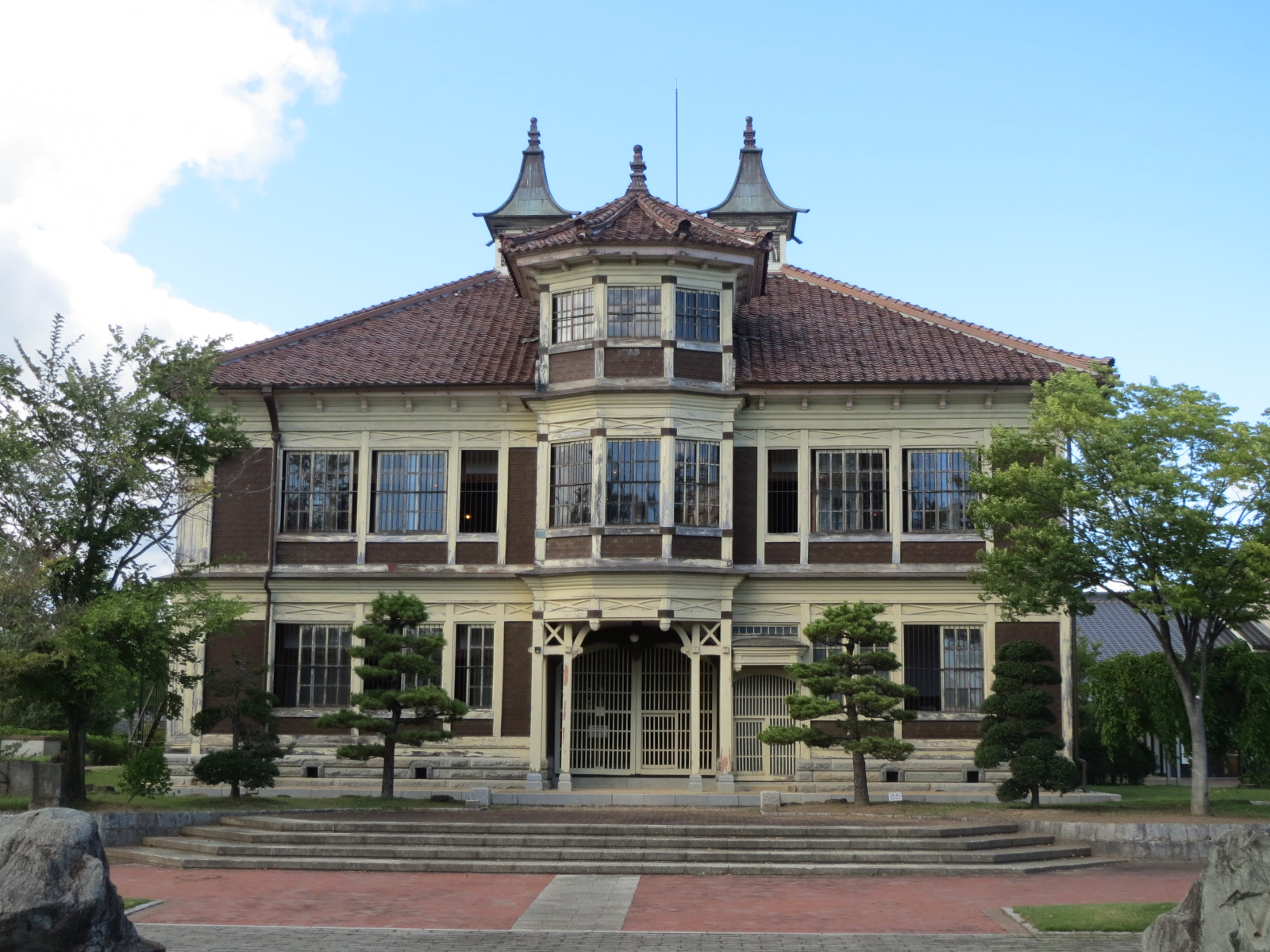 伊達市にある旧亀岡家住宅